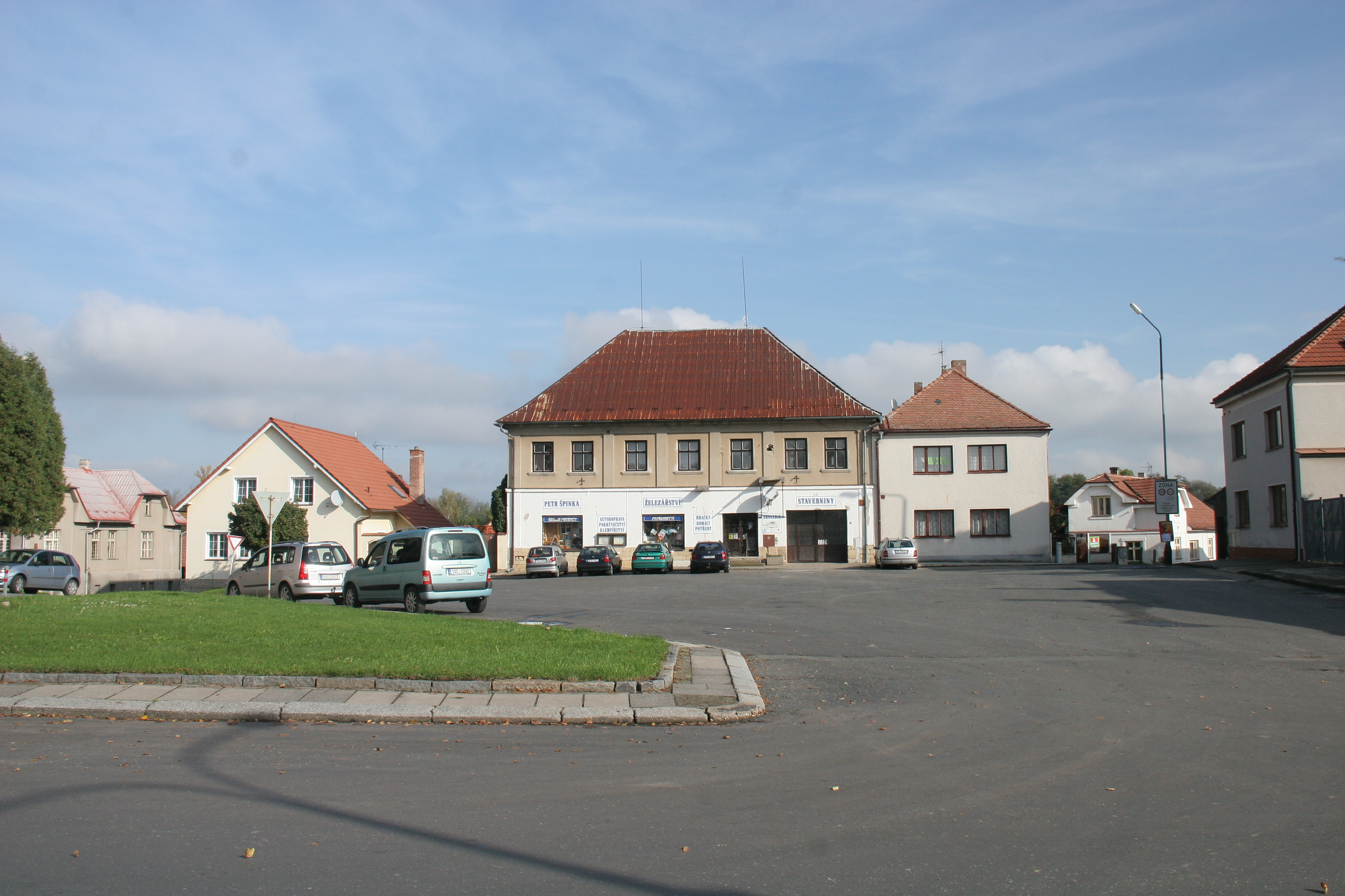 Žiželice Masarykovo náměstí 68